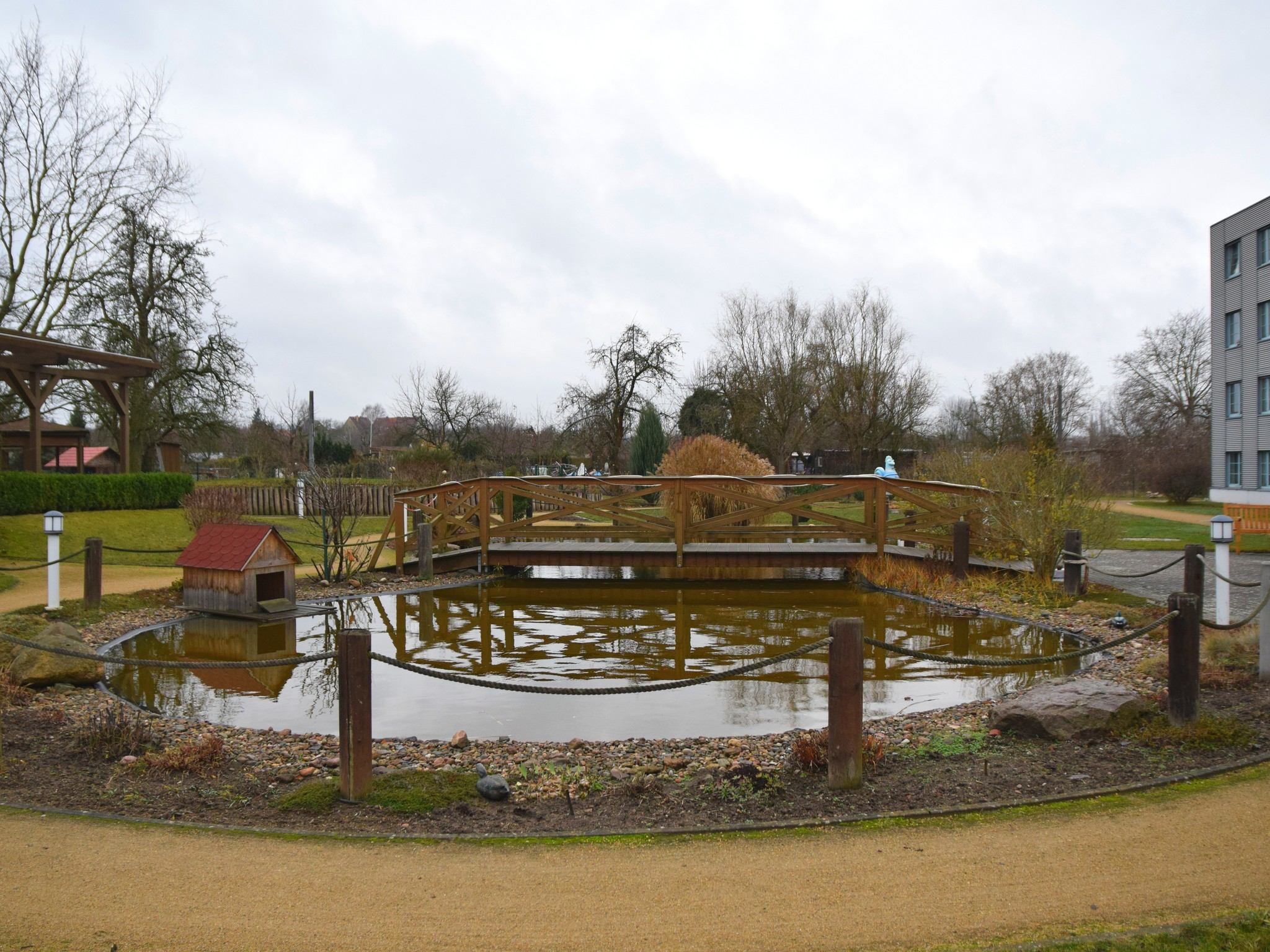 Teich am Altenheim Markendorfer Straße, Frankfurt (Oder)